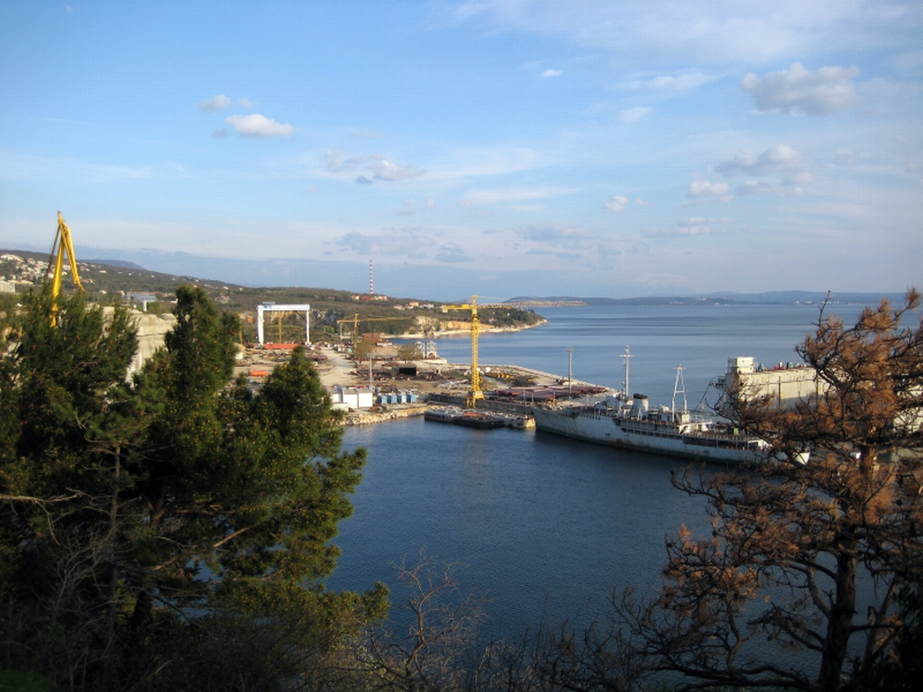 brodogradilište Viktor Lenac i bivši Titov brod Galeb